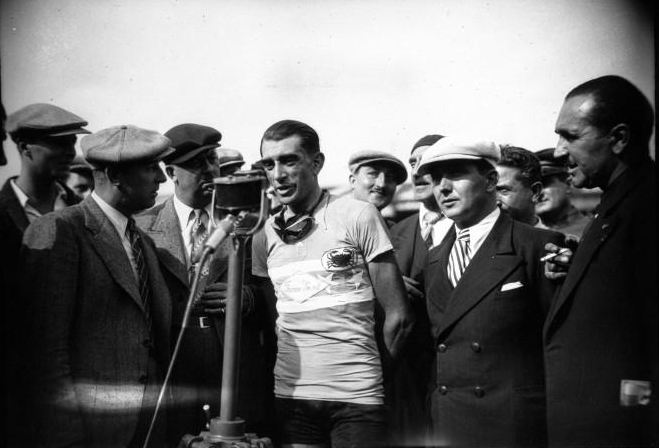 Antonin Magne au micro lors du Grand Prix des Nations 1934